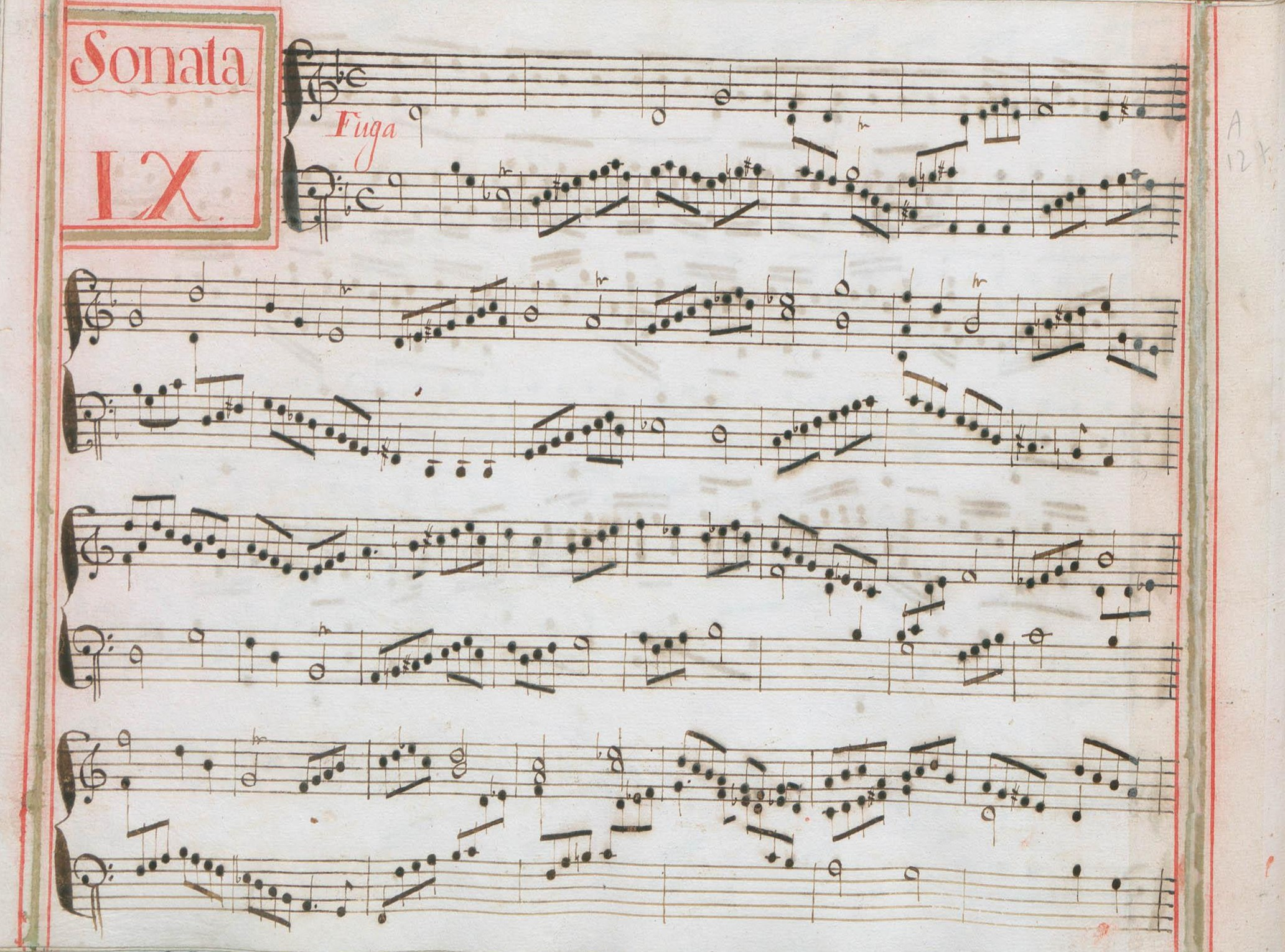 La sonate K. 93, telle qu'elle se présente dans le manuscrit de Venise, volume XIV no. 60. Elle ferme volume (la sonate suivante, K. 52 est déjà présente au no. 10 du même volume et ne présente que des variantes mineures), comme la fugue des Essercizi per gravicembalo.